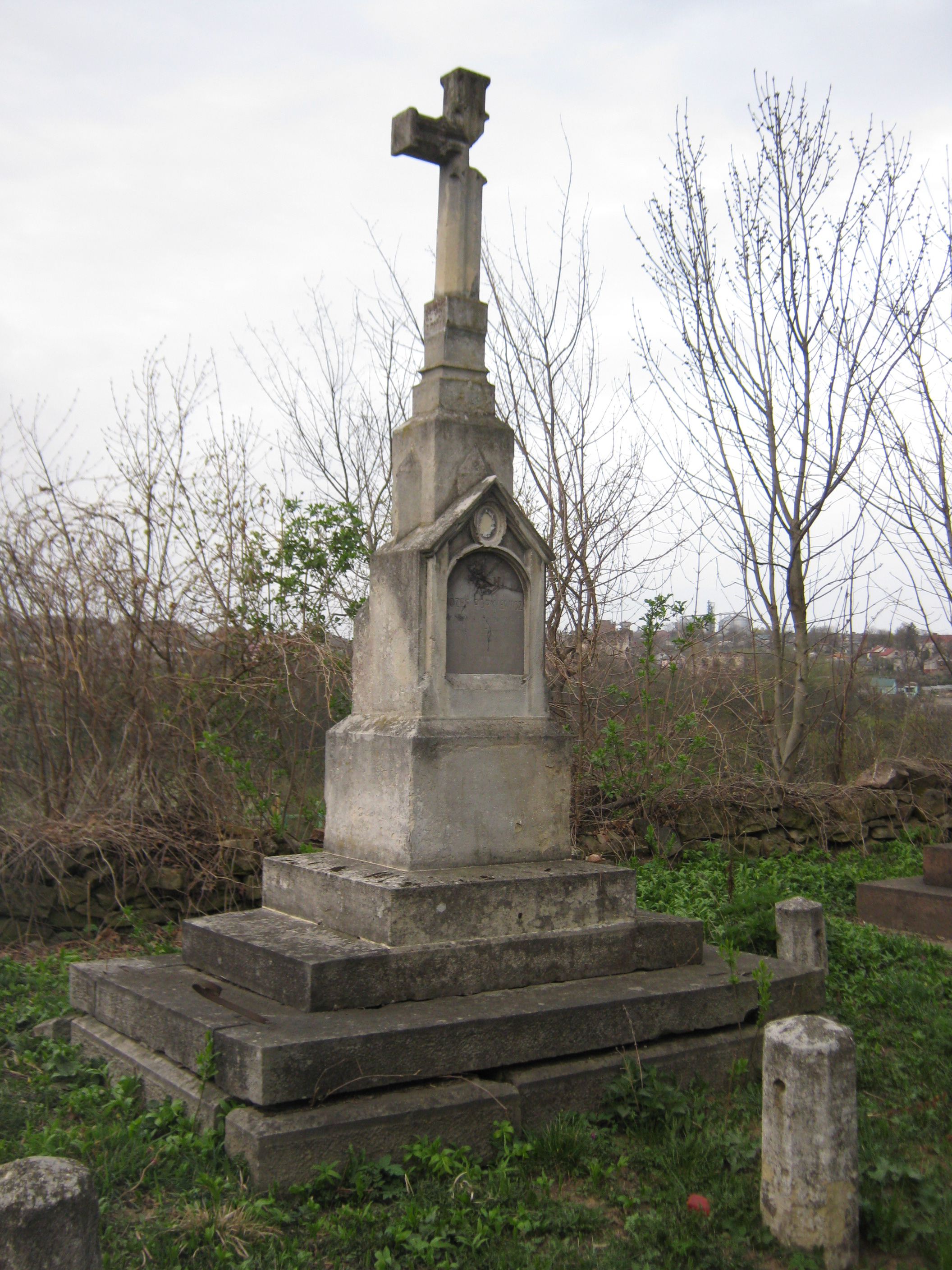 Надгробок цісарсько-королівського судді і старости Юзефа Попкєвіча, міський цвинтар, Бучач, 2016